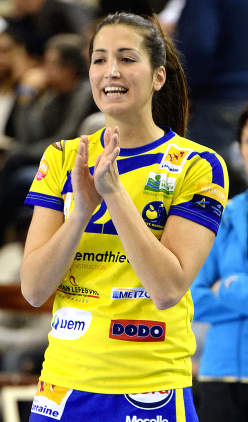 Lara González Ortega , lors de la rencontre de la 10e journée en Issy Paris Hand et Metz Handball, le 12 novembre 2014. Au stade Robert Carpentier à Issy les moulineaux.